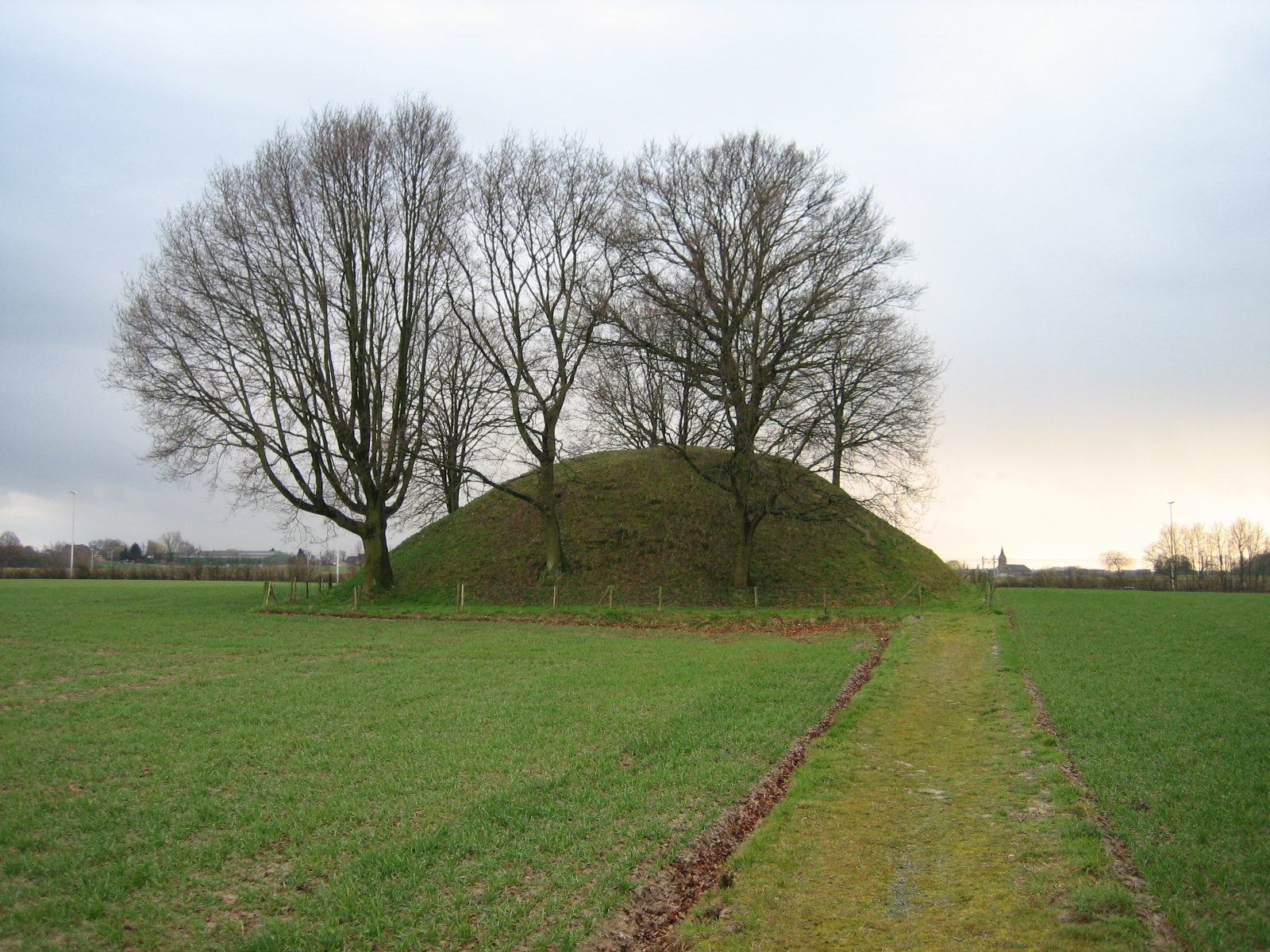 "Avernassentombe", een Tumulus laanscht d'E40.